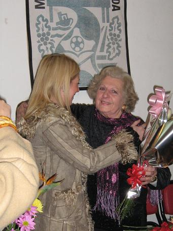 Presentación de Desvelos